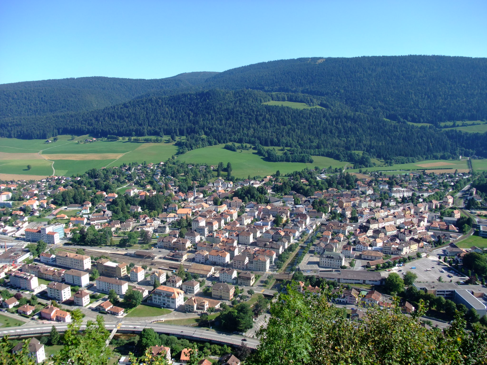 Fleurier vu depuis le belvédère au nord de la ville